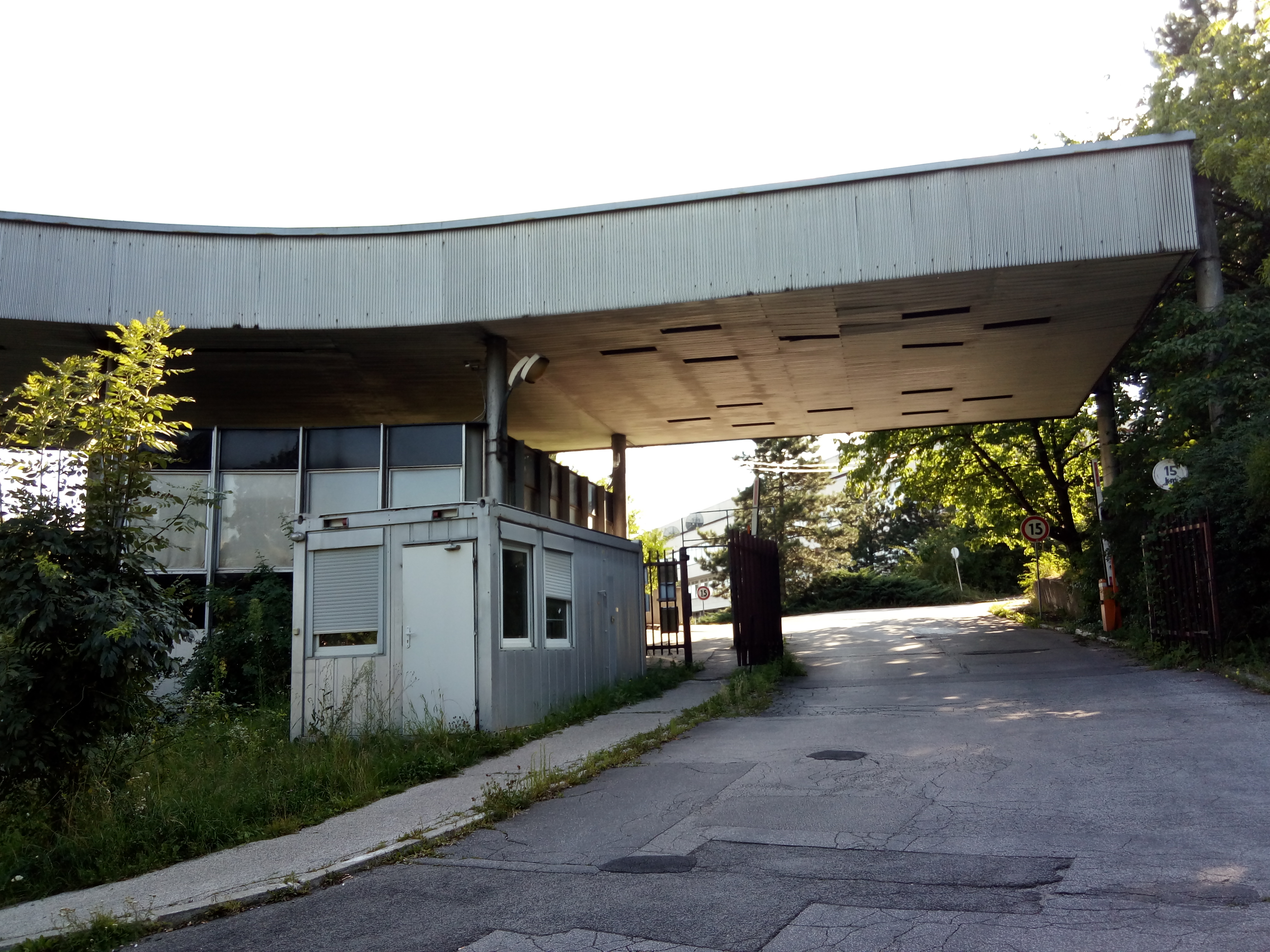 Brečtanová 1, Nové Mesto, Bratislava